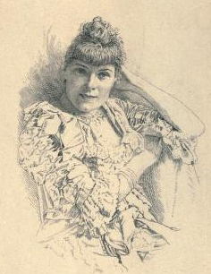 Frontispice du livre Poésies de Daniel Lesueur publié en 1896 et représentant Daniel Lesueur, jeune fille (1860 – 1920)